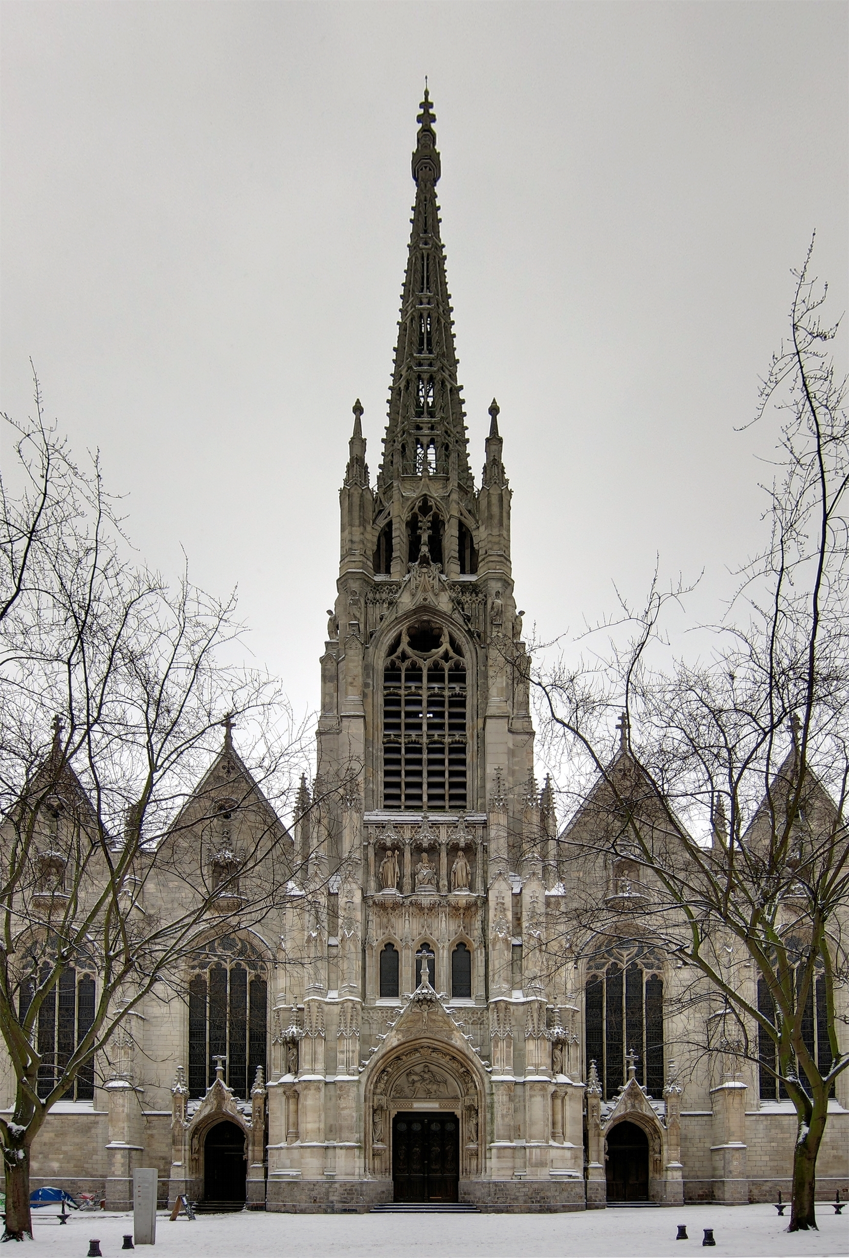 L'Église Saint-Maurice de Lille.